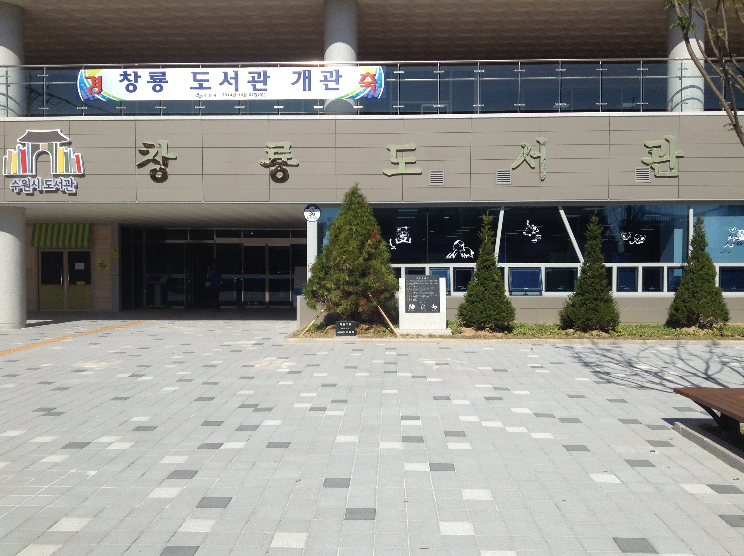 수원 창룡도서관 1층 입구 모습